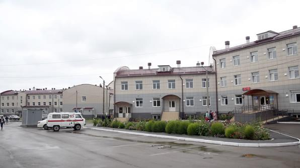 Поликлиника, 2016-й год.